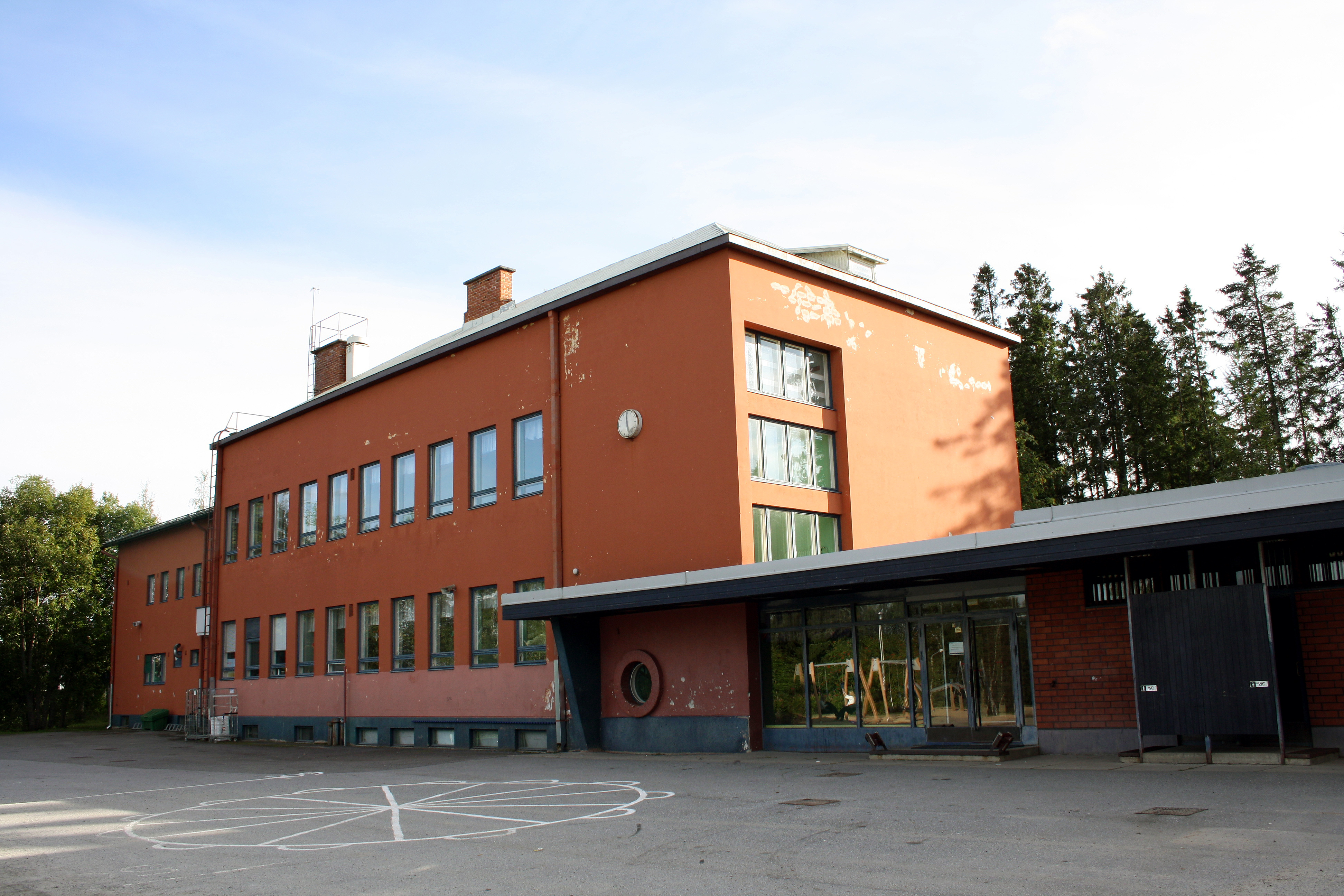 Jokilaakson koulu Kokkolassa, Suomessa.